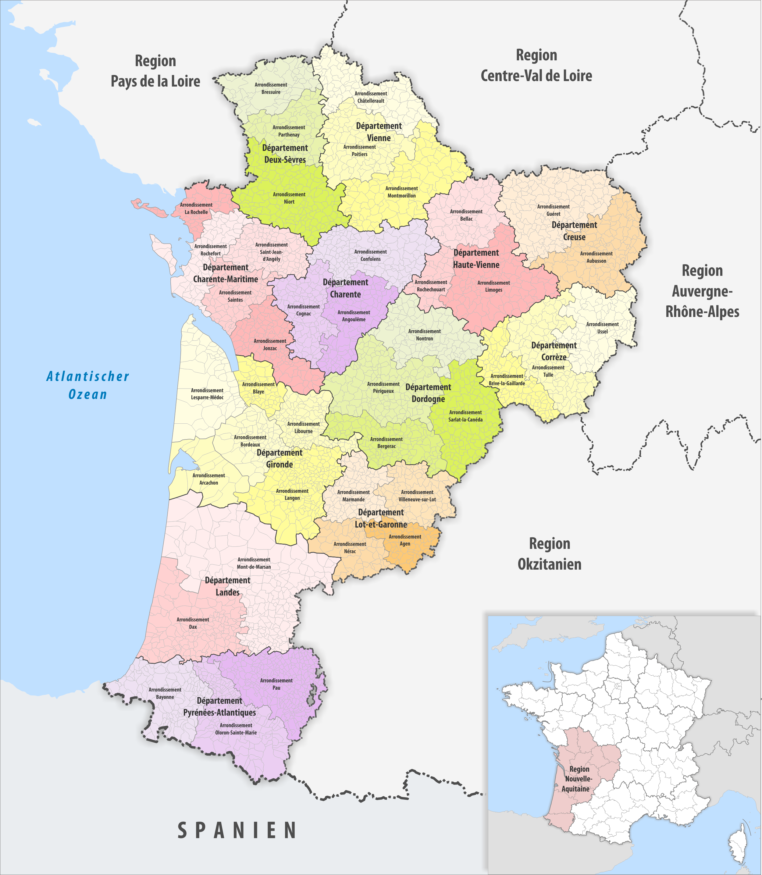 Gemeinden, Arrondissemente und Departemente in der Region Nouvelle-Aquitaine